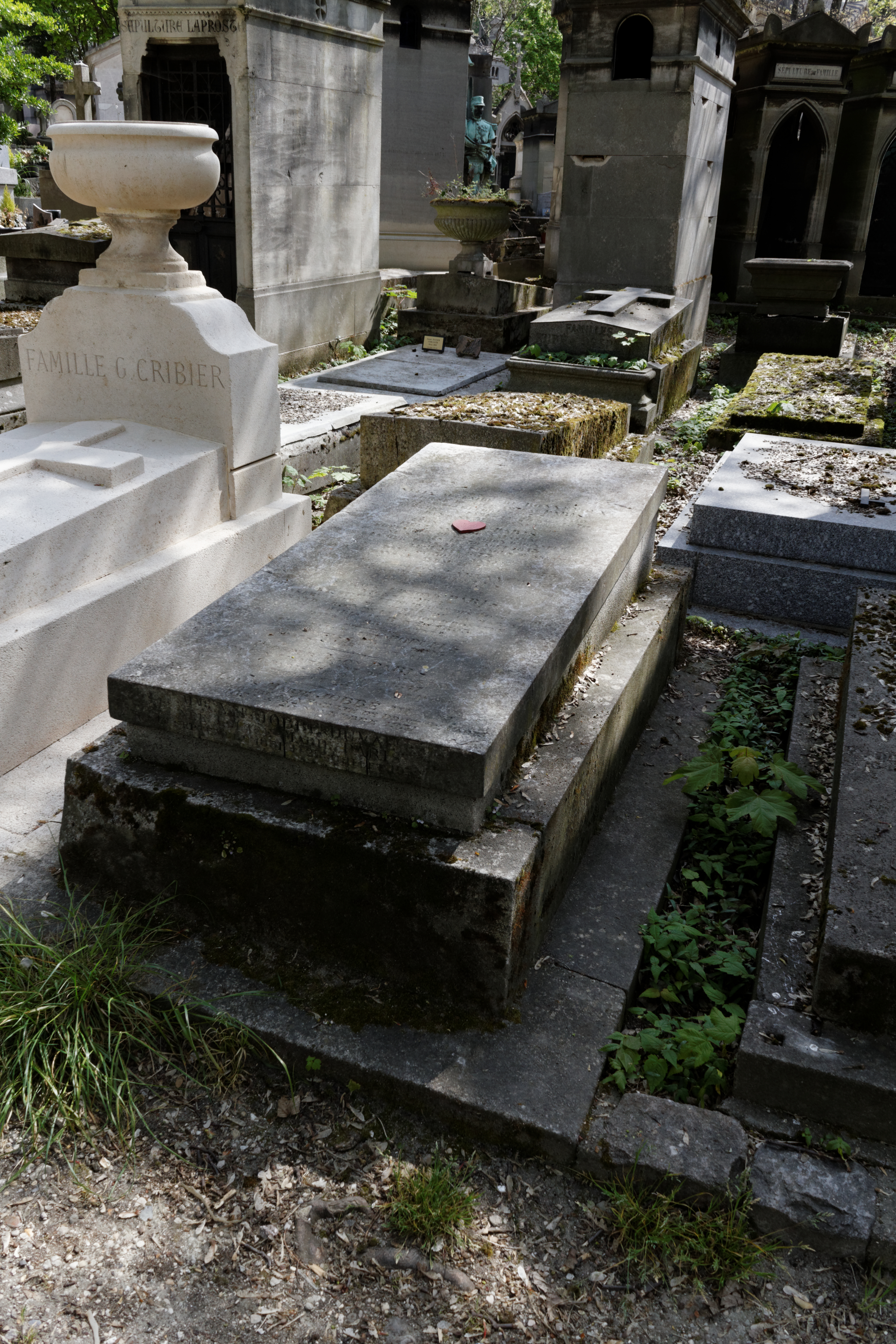 Sépulture de François-Edmond Pâris (1806-1893), vice-amiral, connu pour ses travaux en construction navale dans la période de développement de la propulsion à vapeur, pour son rôle dans l'organisation du Musée de la Marine et pour ses publications sur la construction navale dans le monde. Il est également considéré comme le père de l'ethnographie nautique.